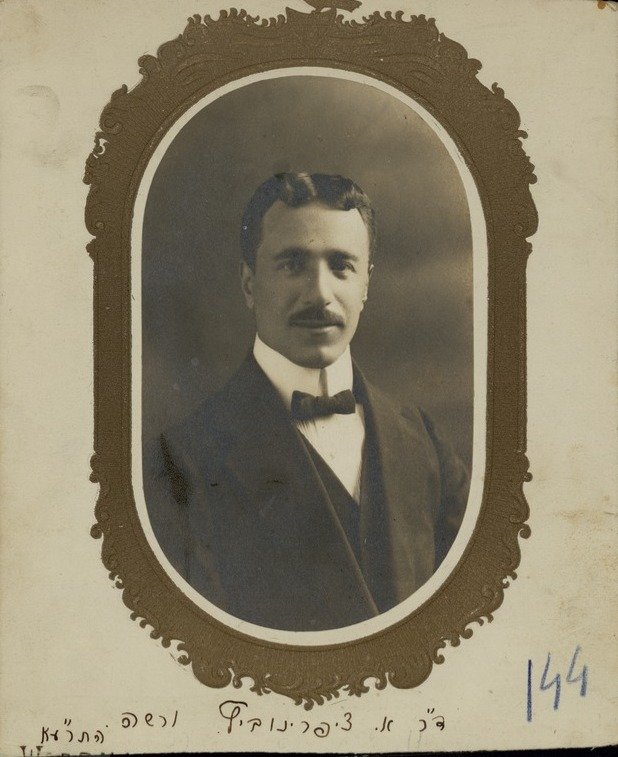 תצלום דיוקנו של אברהם צפרוני: הדפס שחור לבן, מודבק על גבי כרטיס מעוטר בגודל 14X17 ס"מ, חתוך בקצותיו. בתחתית הכרטיס, חתם צפרוני את שמו: "ד"ר א. ציפרינוביץ. ורשה, התרע"א". תצלום זה נשלח על ידי צפרוני למערכת כתב העת "השלח" לשם פרסום בגליון היובל, 1912.